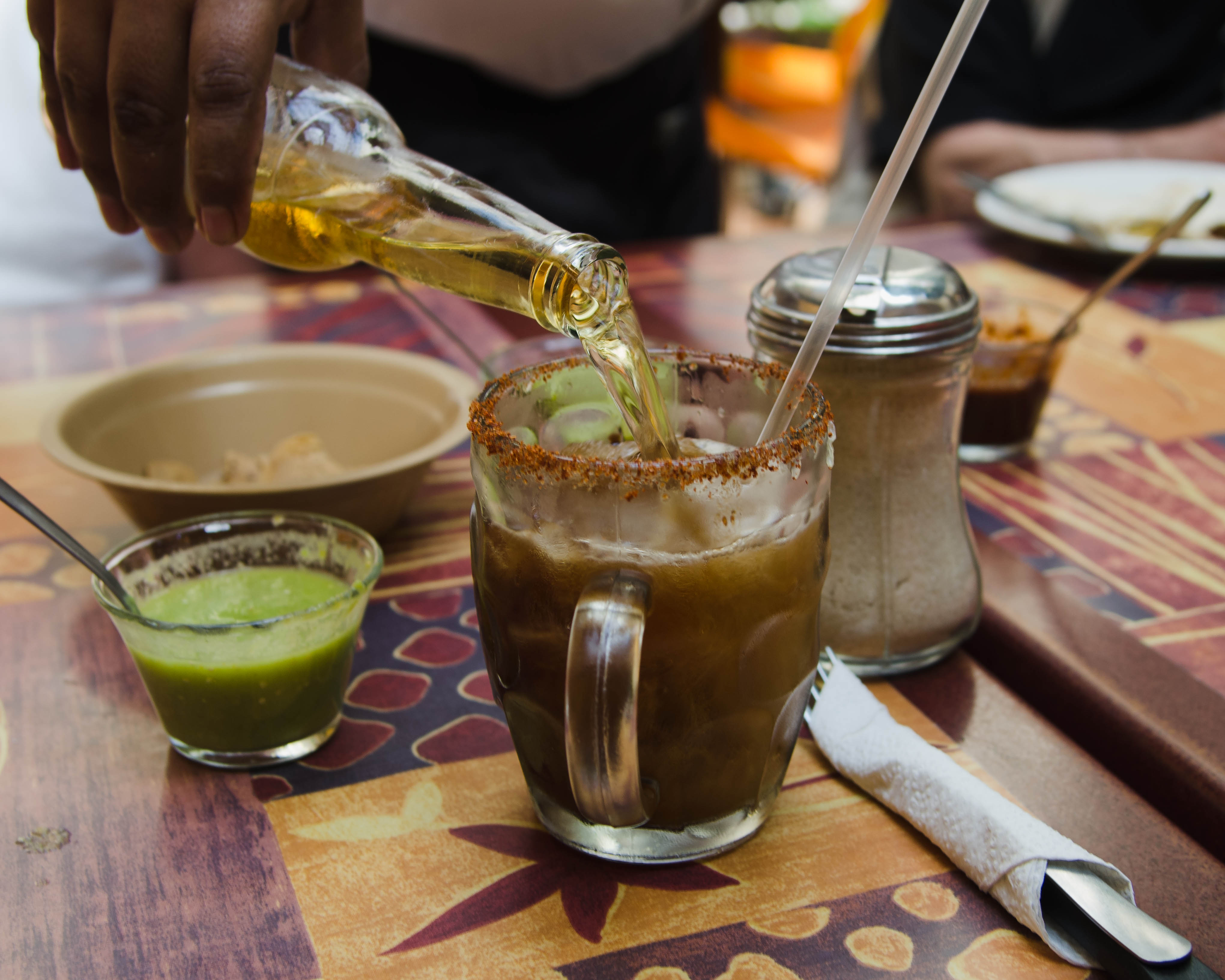 micheladas